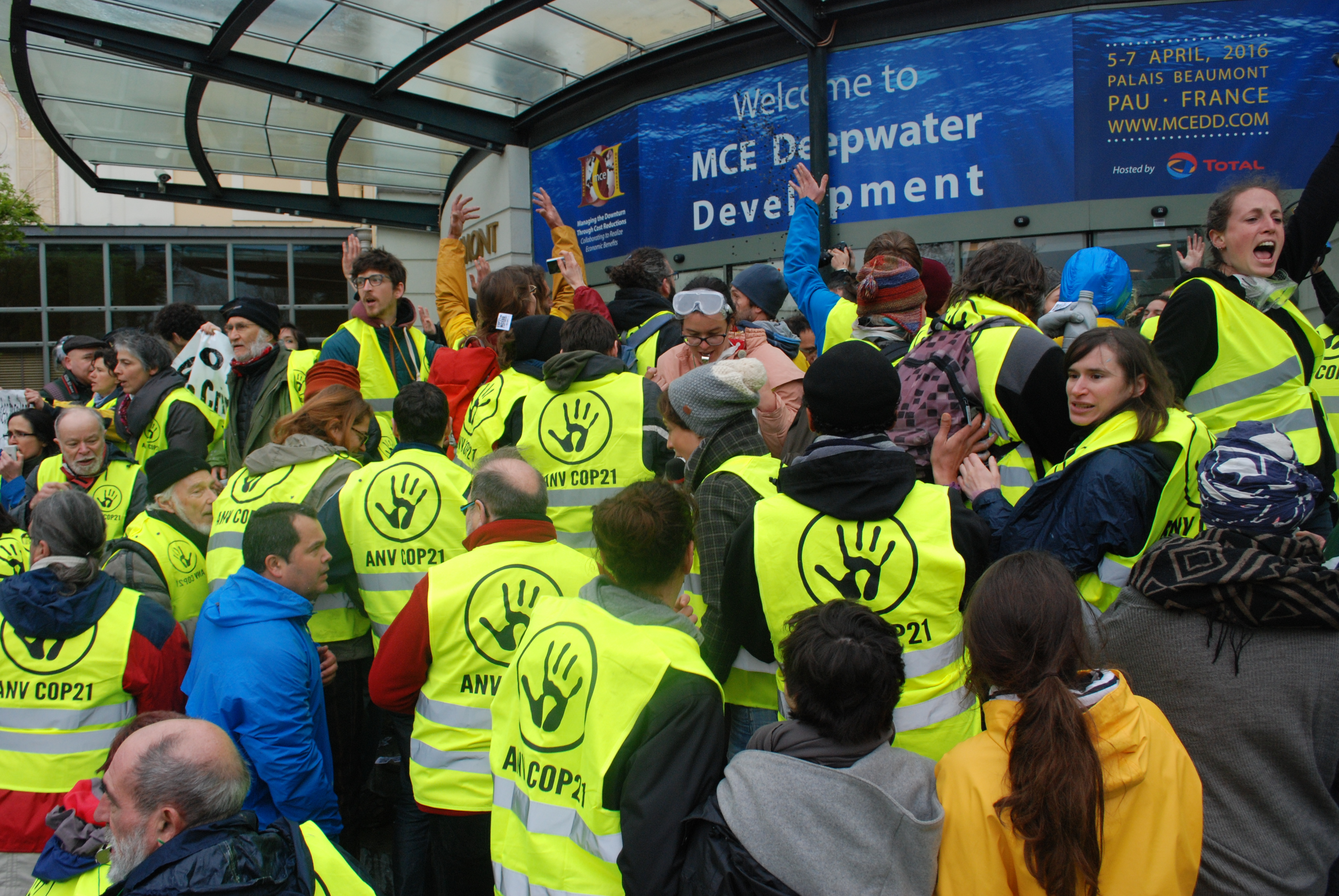 Activistes climat d'Action non-violente COP21 (ANV-COP21) bloquant l'entrée du sommet MCE Deepwater Development, à Pau le 5 avril 2016, pour protester contre l’organisation, quatre mois après la COP21, d’un sommet visant à développer encore davantage l’exploitation des hydrocarbures.